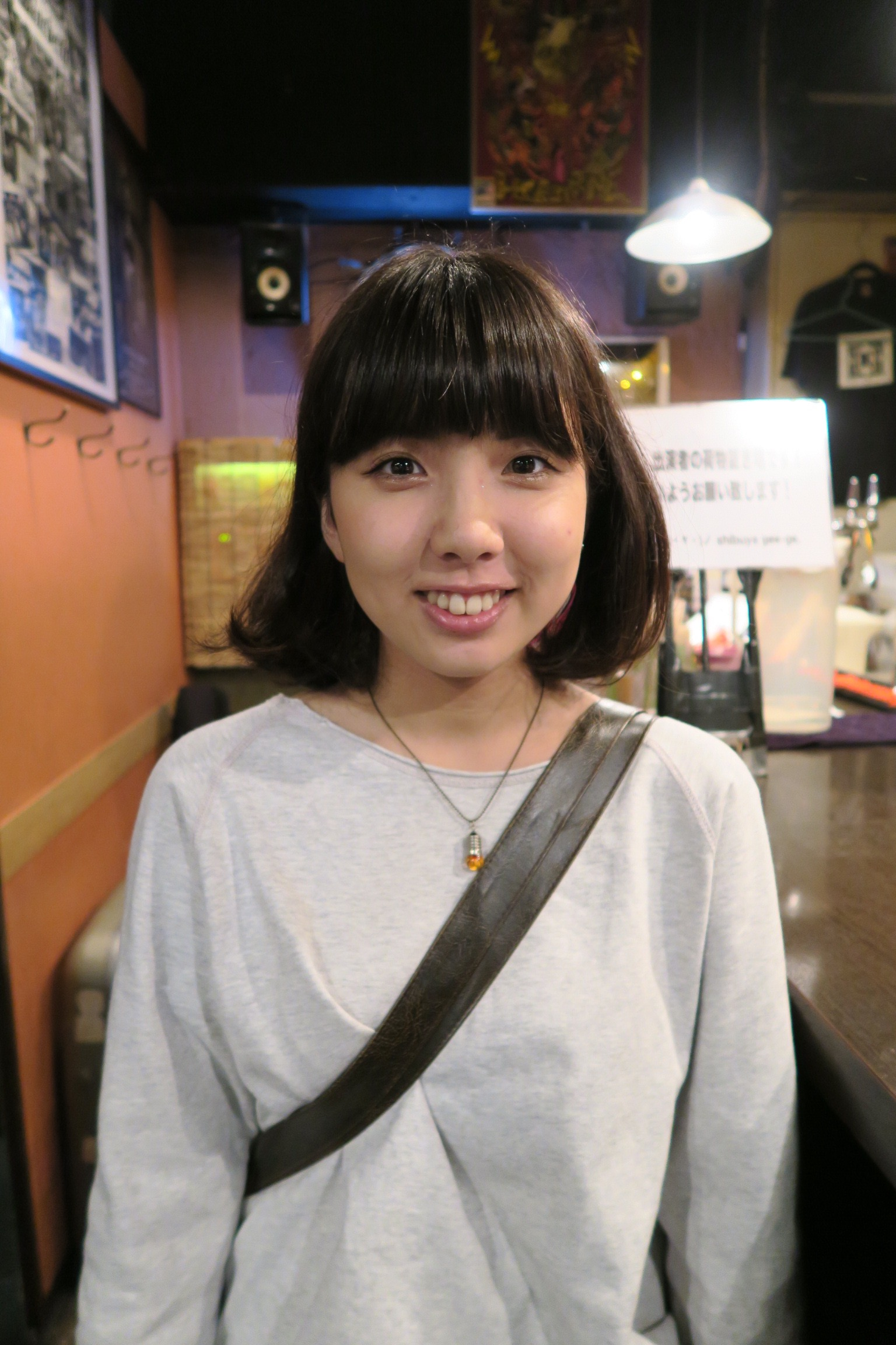 植田真衣（シンガーソングライター）